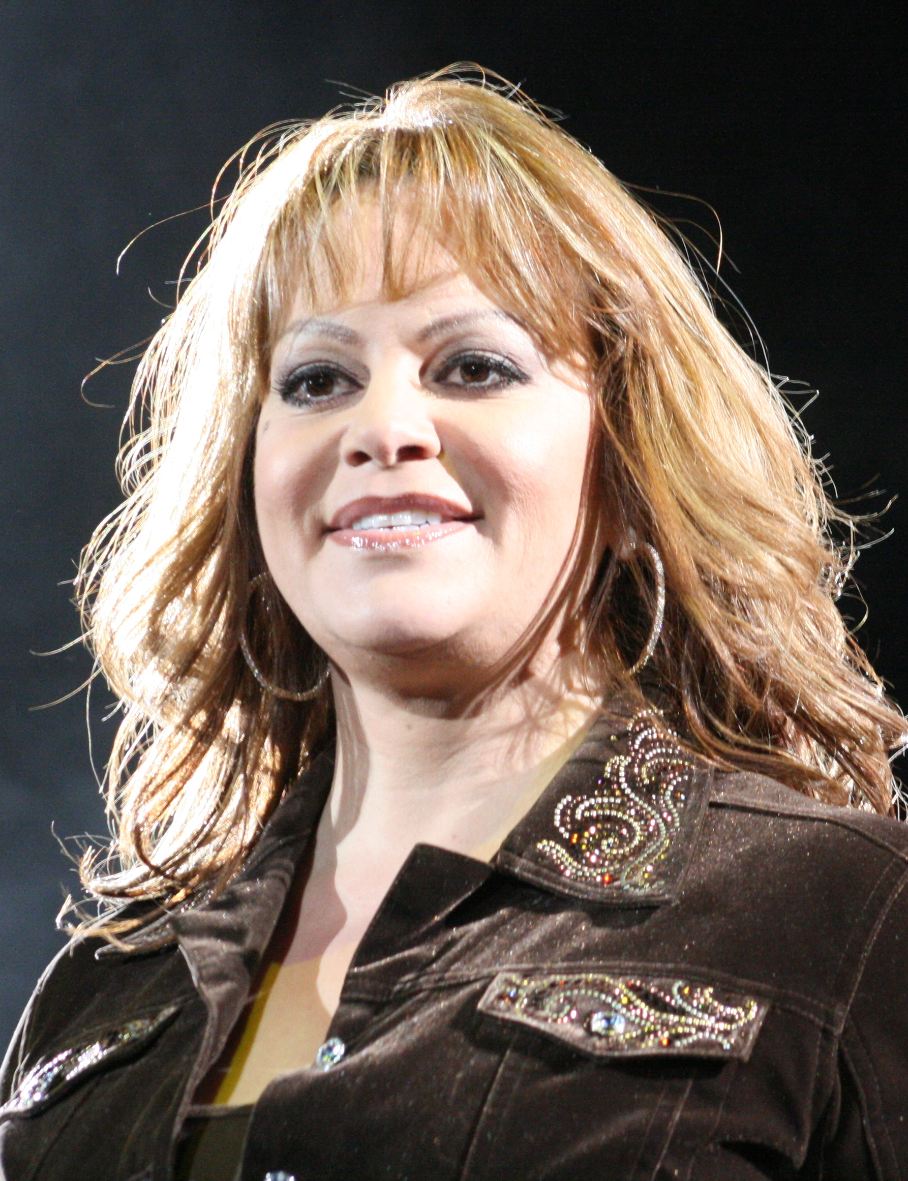 Jenni Rivera en el Pepsi Center (08.22.09)